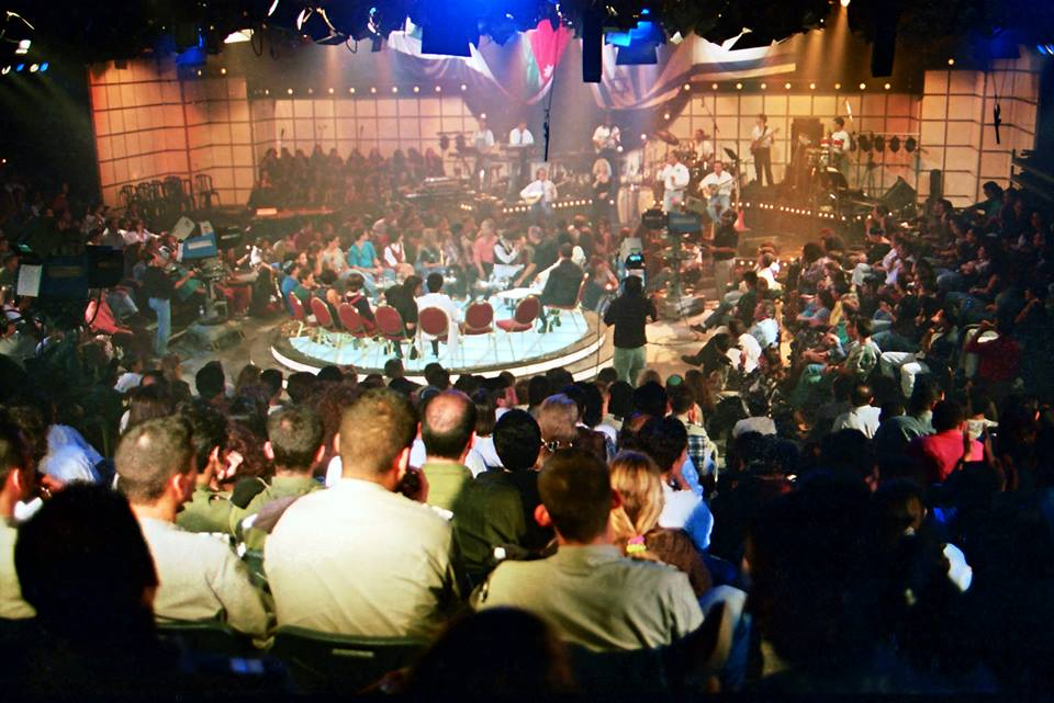 דן שילון במעגל